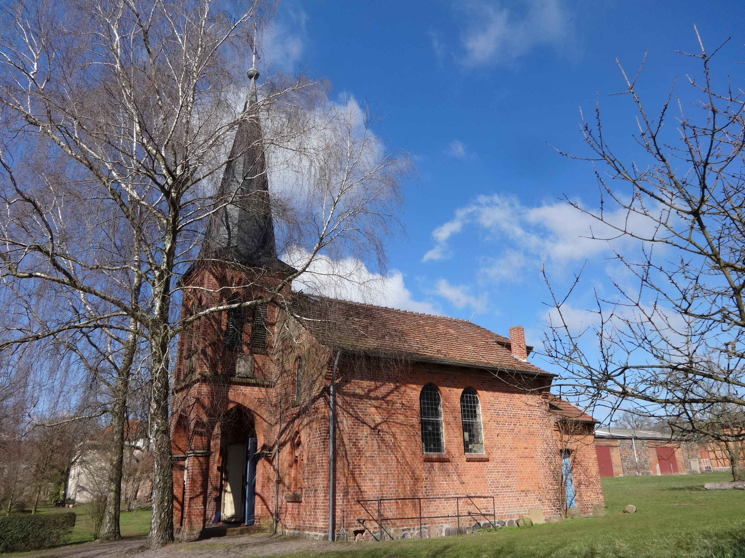 Die Gutskirche ist Bestandteil einer unter Denkmalschutz stehenden Gesamtanlage bestehend aus einem Herrenhaus mit Aulaanbau und Gästehäusern, Wirtschaftshof mit Verwalterhaus, Kuhstall, Pferdestall, Scheune, alter Scheune, Schweinestall, Ochsenstall und Spritzenhaus. Sie entstand im Jahr 1898 als neugotischer Backsteinbau.